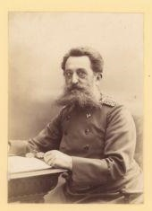 Fotografie des Chirurgen und Militärarztes Albert Köhler